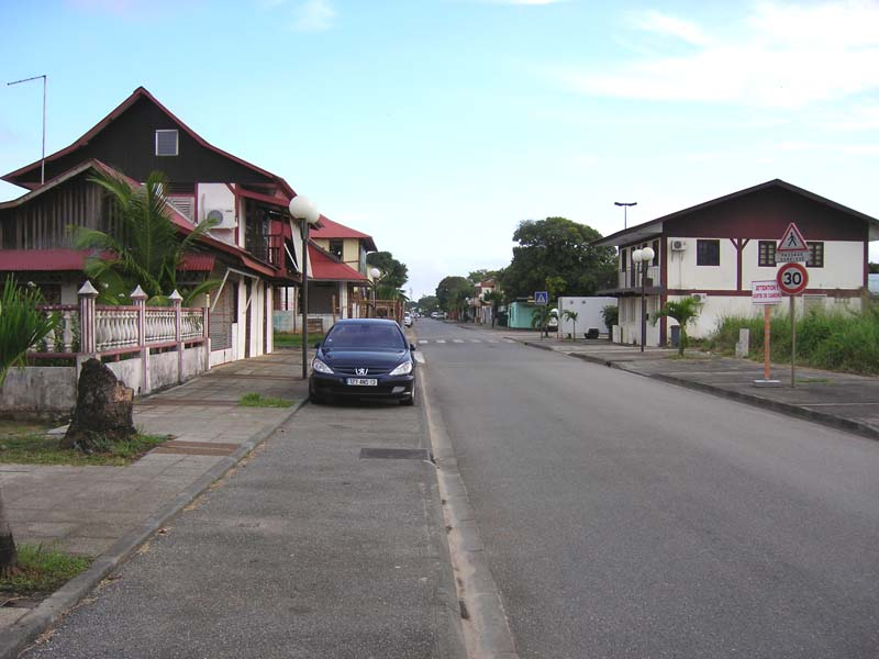 Vue du "vieux" Kourou (2006)